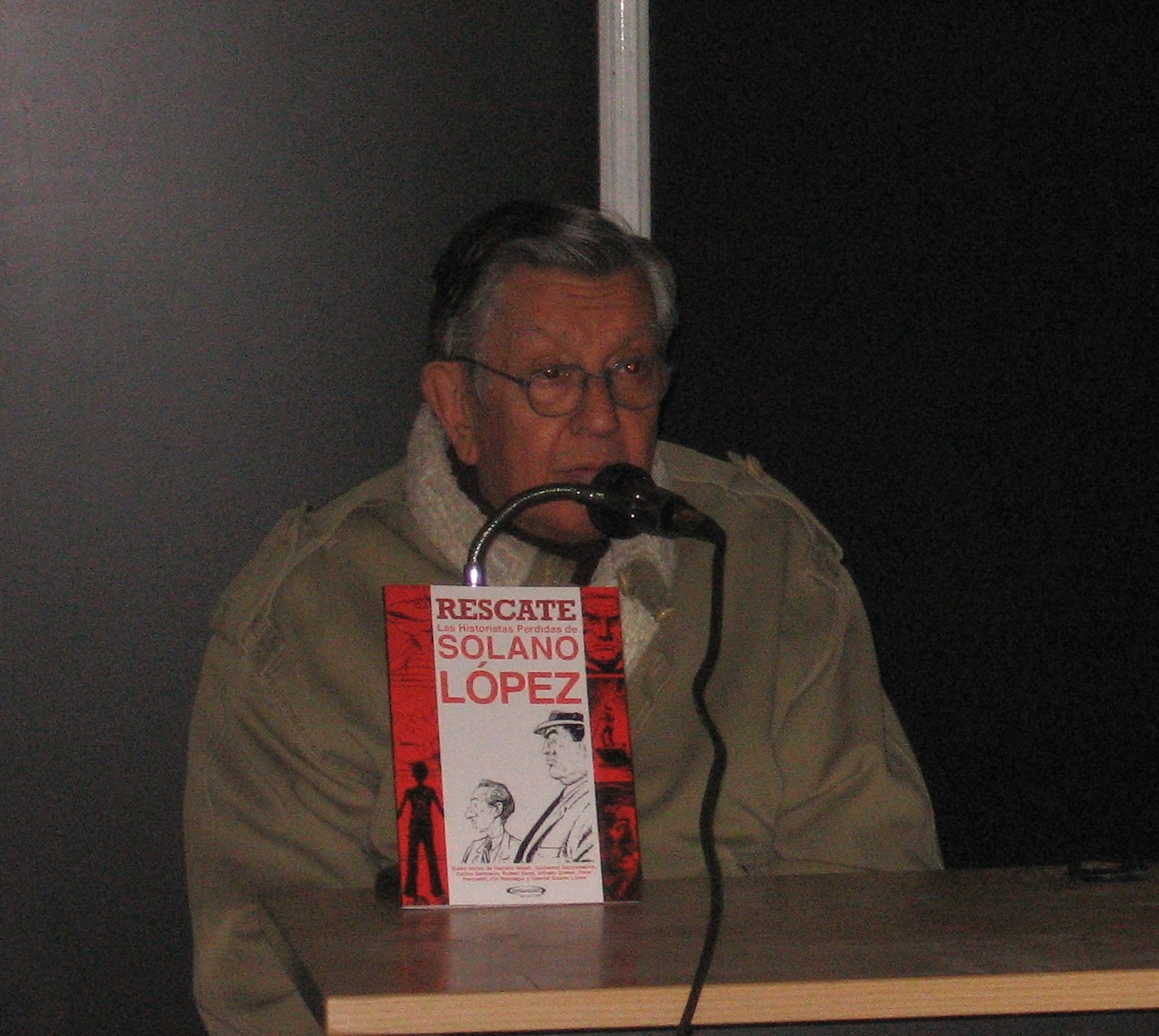 Francisco Solano López en la convención de historietas "Animate!", en la presentación del libro "Rescate: Las historietas perdidas de Solano López" de Domus Editora